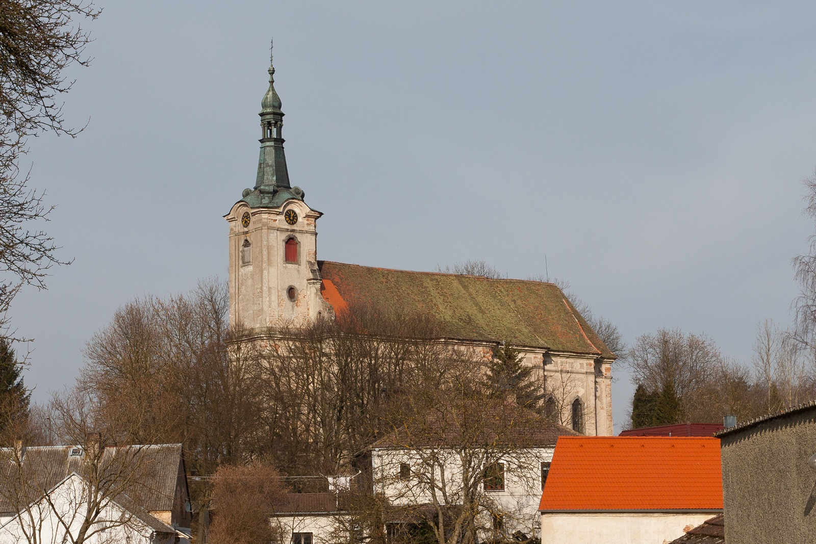 Kostel sv. Petra a Pavla (Bernartice), Bernartice